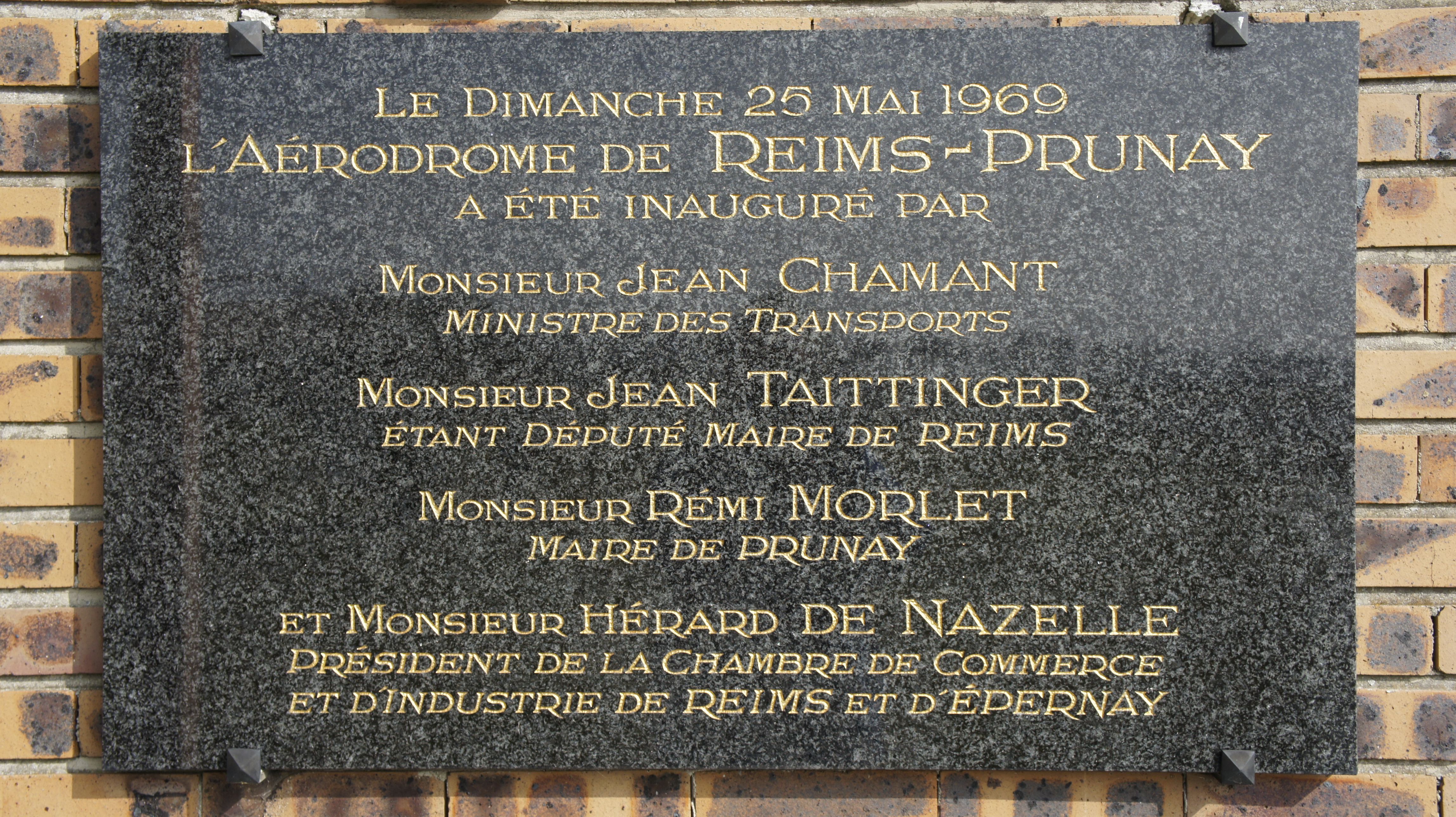 Plaque d'inauguration de l'aéro-club de Reims Prunay .